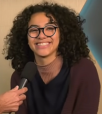 Actriz mexicana Elyfer Torres en 2019